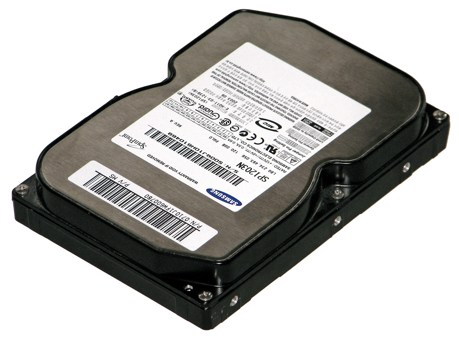 Dieses Bild zeigt eine IDE-Festplatte (Samsung SP1203N - 7200 U/Min - 120 GB).